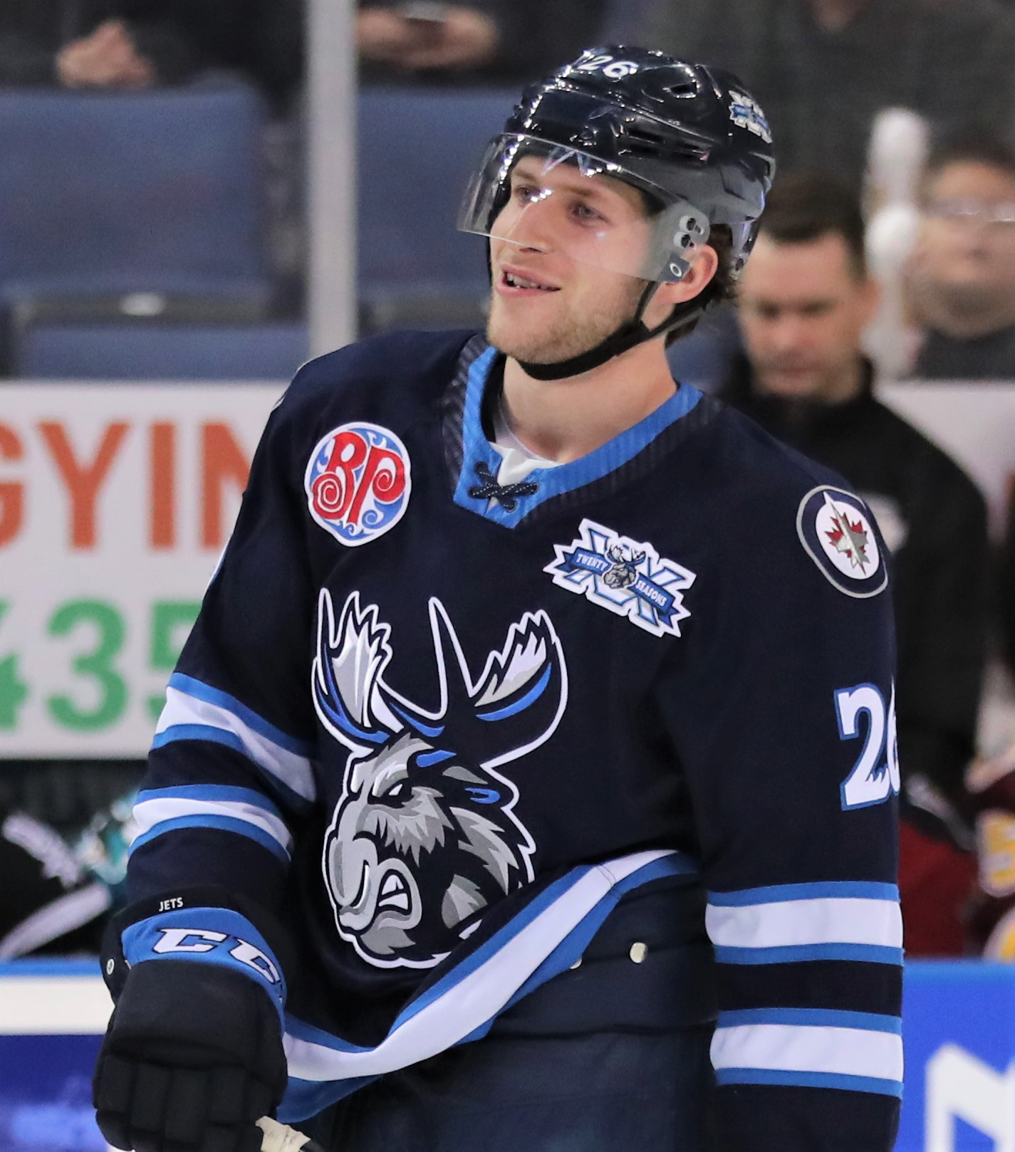 AA3I1923